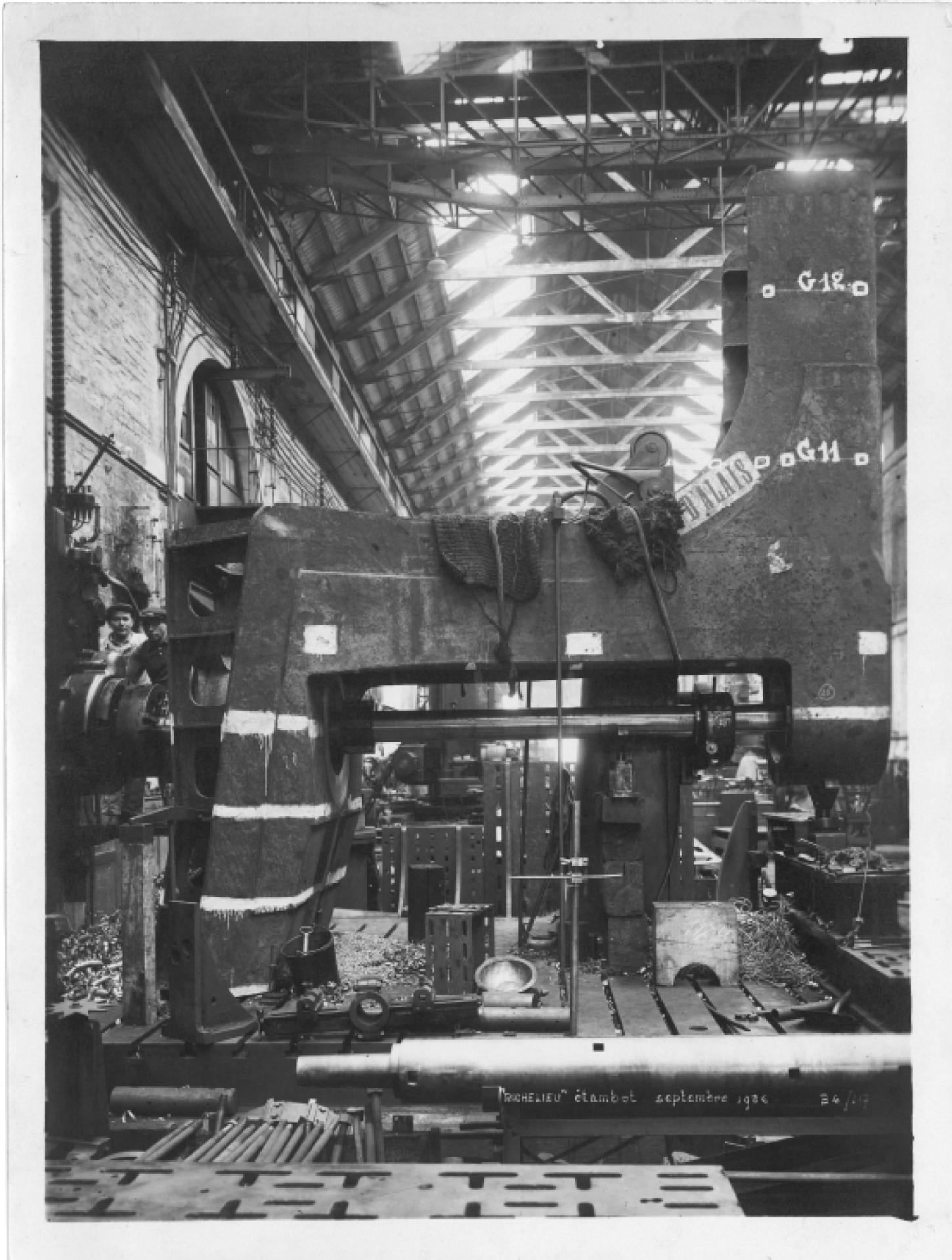 Etambot du Richelieu usiné dans les ateliers Huré à Illkirch Graffenstaden